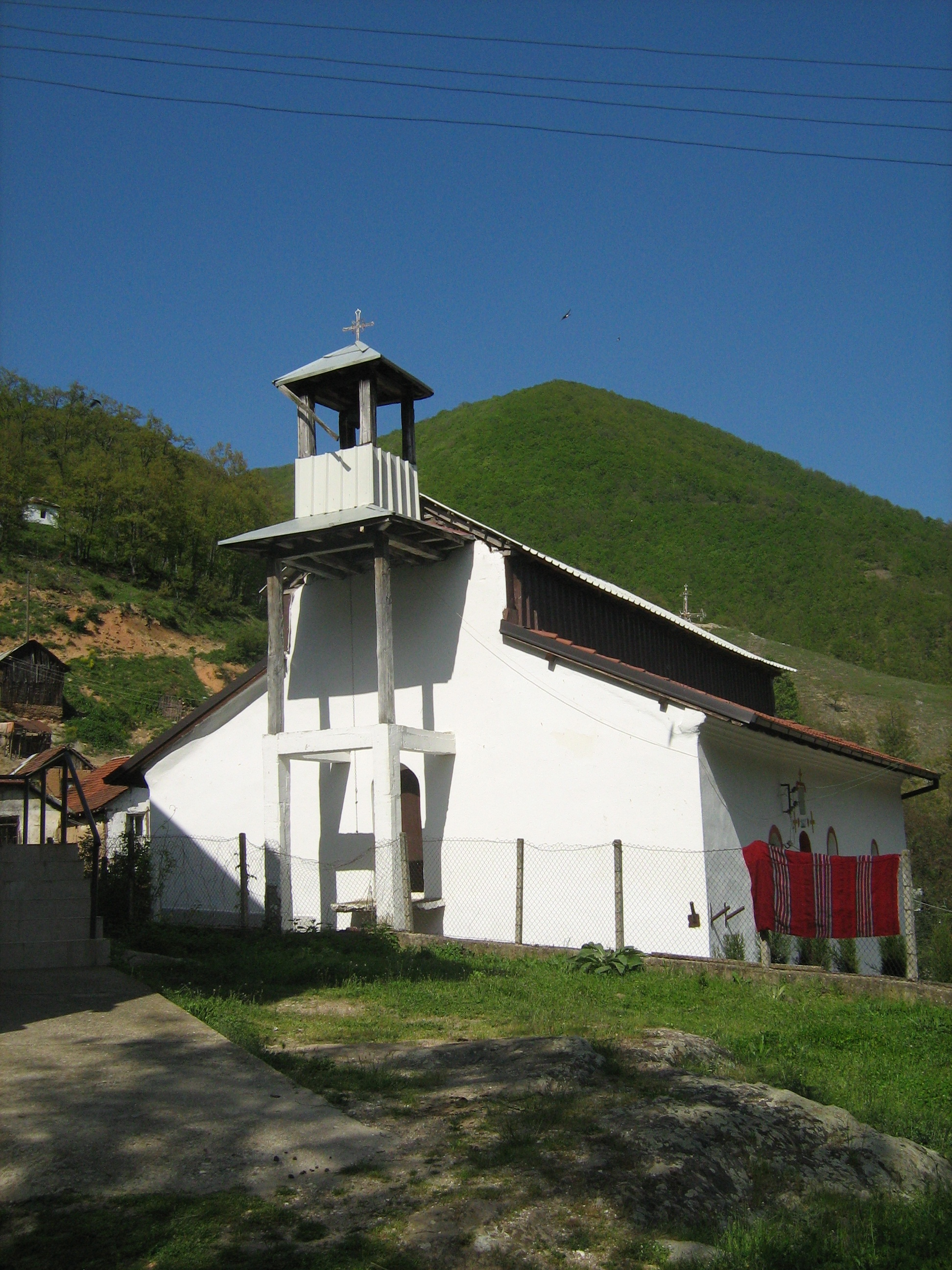 Црква Св. Богородица, поглед од страната на камбанаријата, во село Ореше, Република Македонија